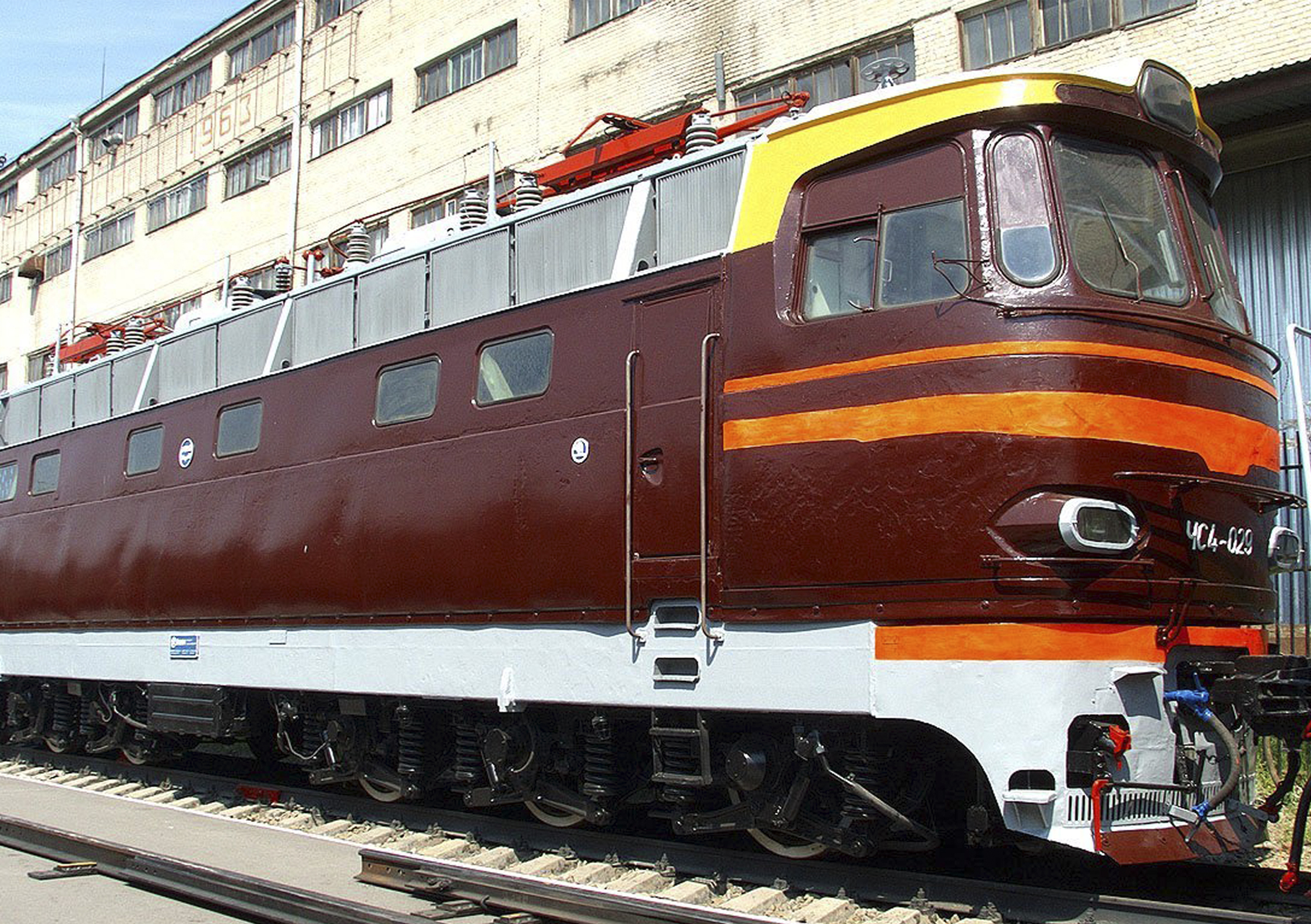 Электровоз построен в 1967 году электровозостроительным заводом «ШКОДА», Чехословакия